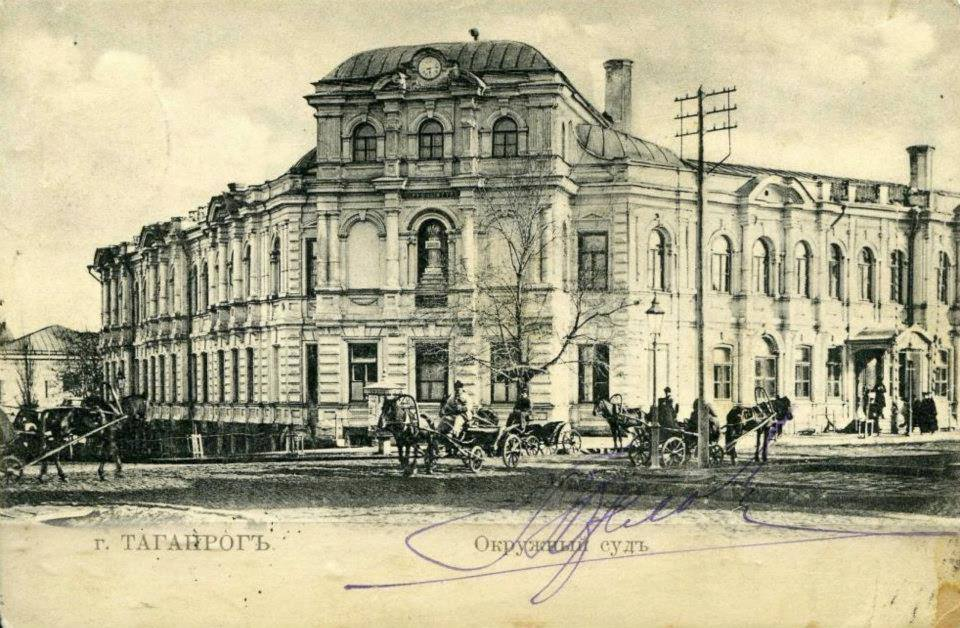 Таганрог здание окружного суда